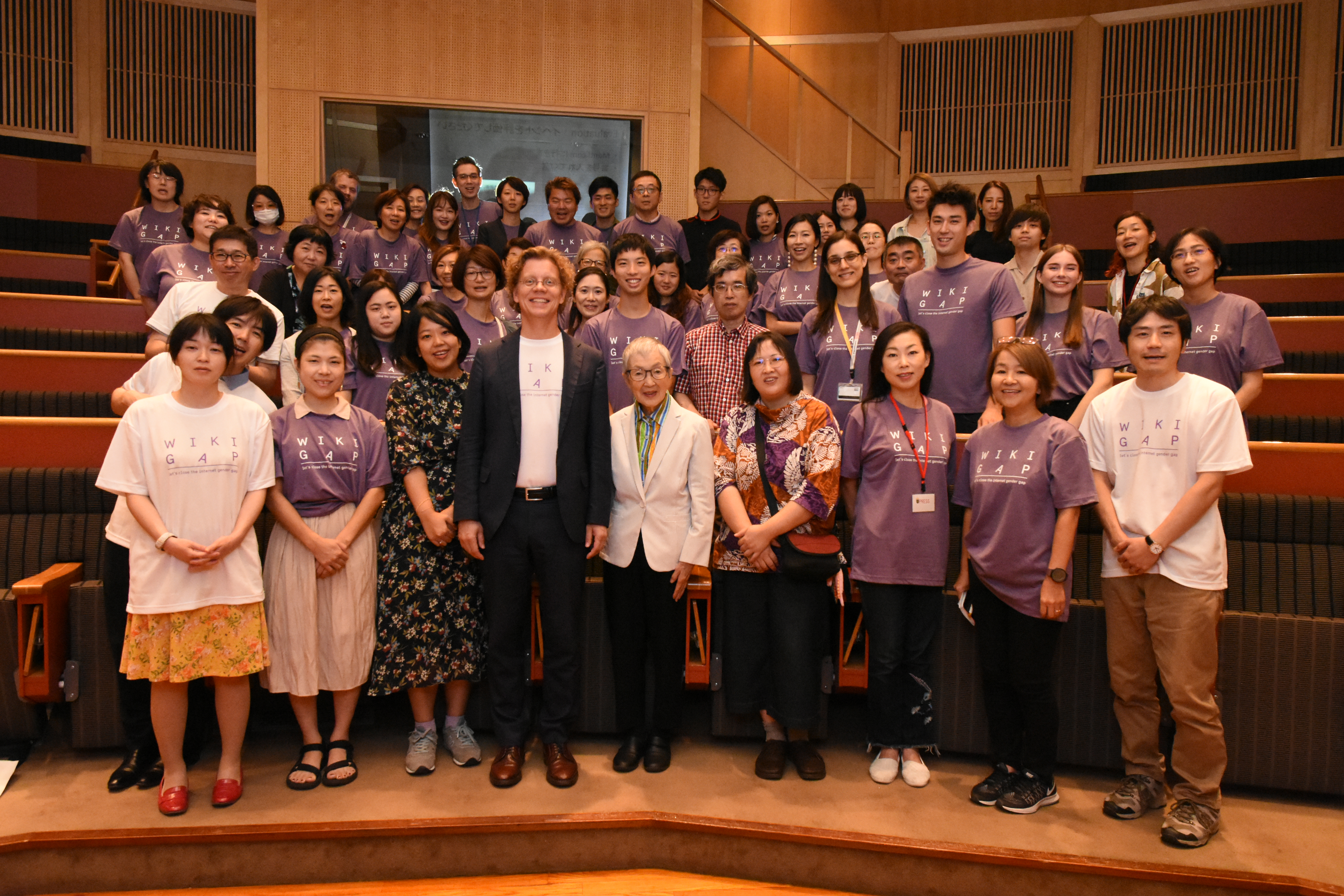 スウェーデン大使館で2019年9月29日に行われたWikiGap参加者の集合写真。